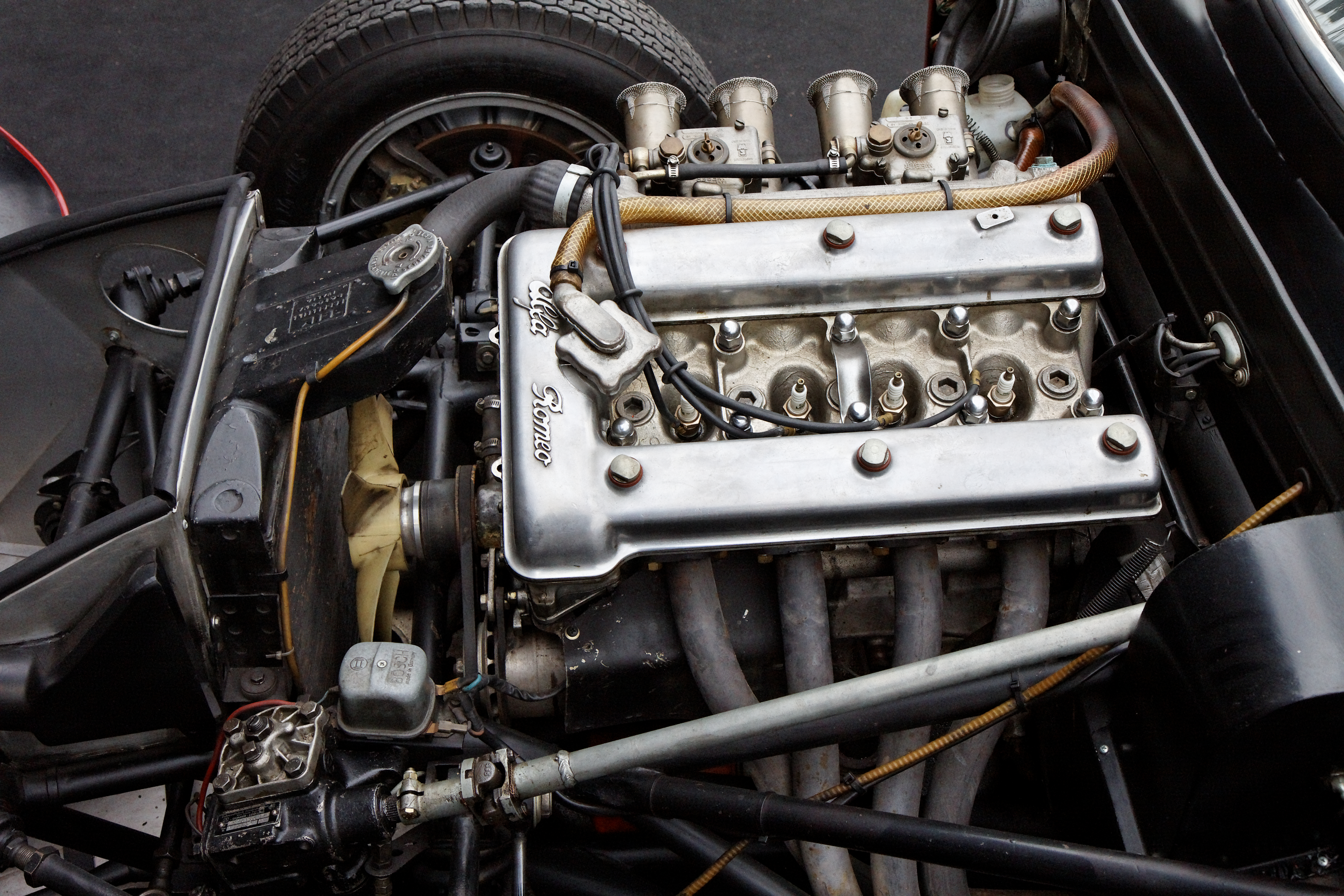 Alfa Romeo TZ - Festival Automobile International 2011 - Vente aux enchères